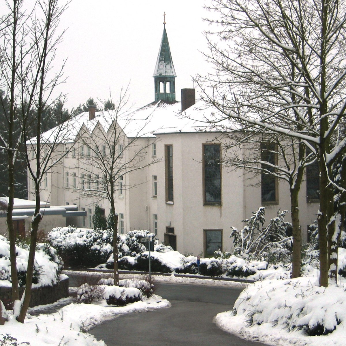 Blick von der Ziegelkämpe aufs Dreifaltigkeitskloster der „Rosa Schwestern“ in der Helmtrudisstraße in Bad Driburg, Nordrhein-Westfalen, Deutschland. Das Kloster mit der Anbetungskirche wurde 1924 als erste Niederlassung der „Kongregation der Dienerinnen des Heiligen Geistes von der ewigen Anbetung“ in Deutschland gegründet.